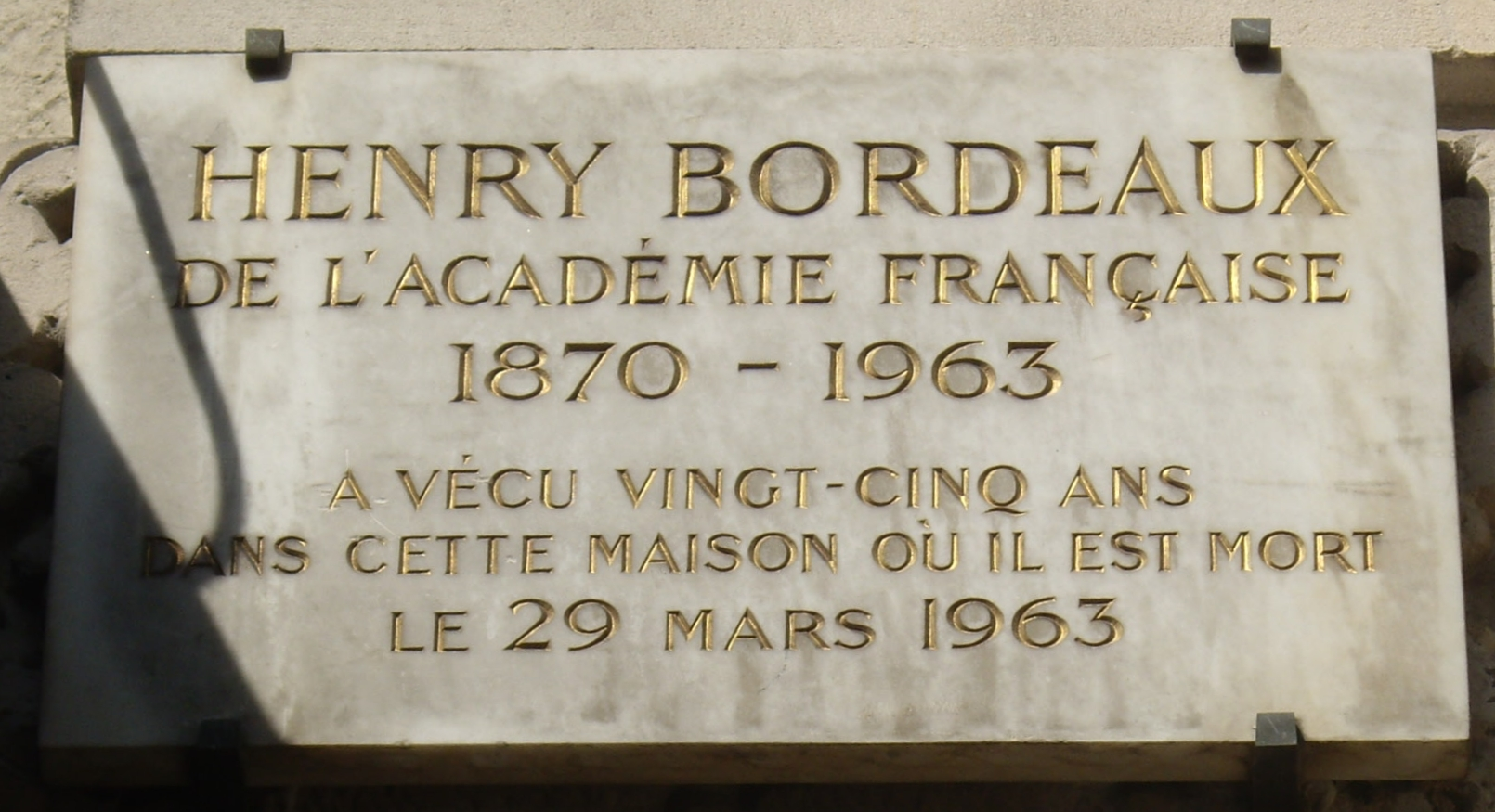 Plaque apposée au n° 8 de la chaussée de la Muette, Paris 16e, où vécut pendant 25 ans l'écrivain Henry Bordeaux (1870-1963) et où il est mort le 29 mars 1963.